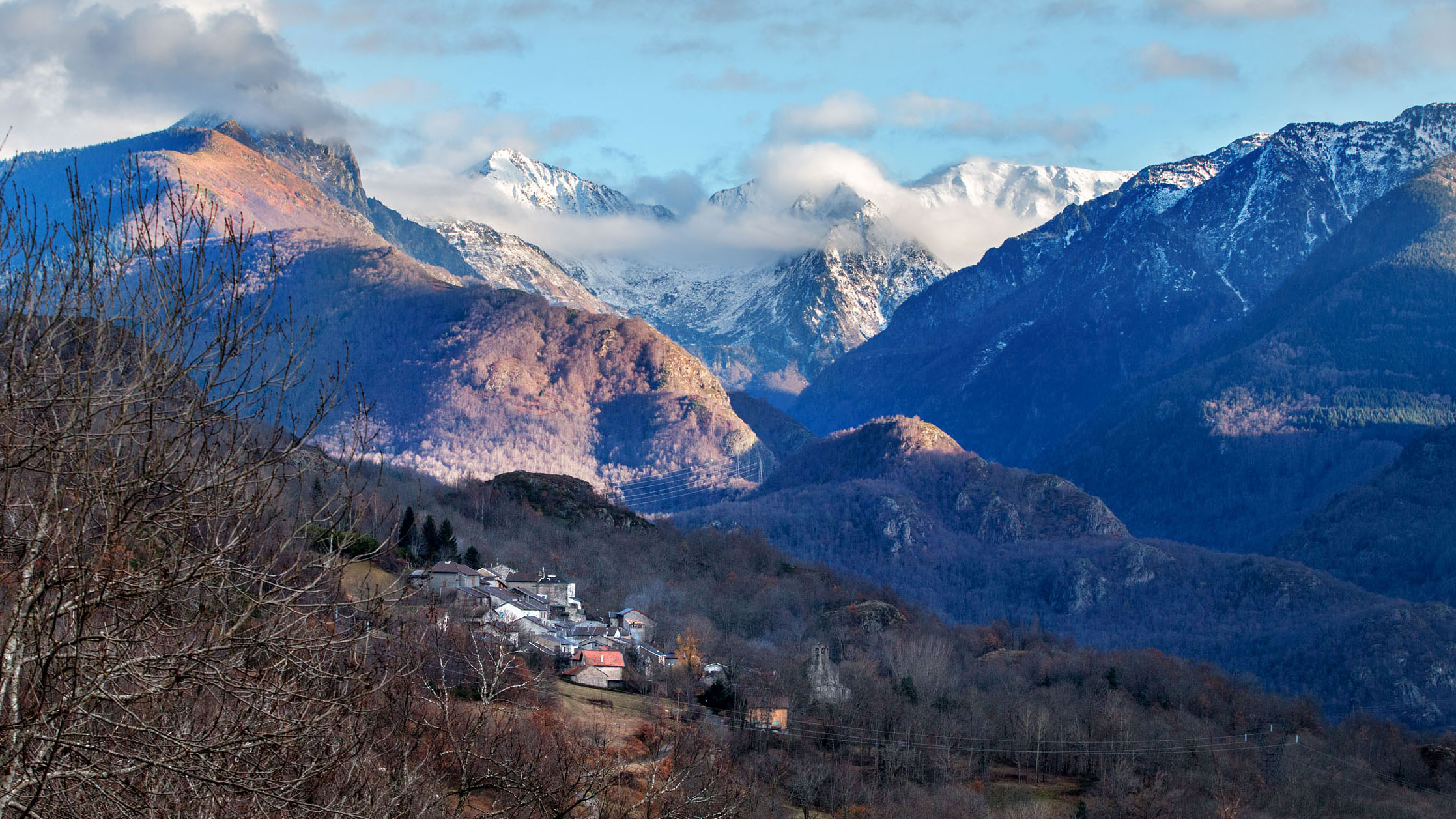 Vue générale